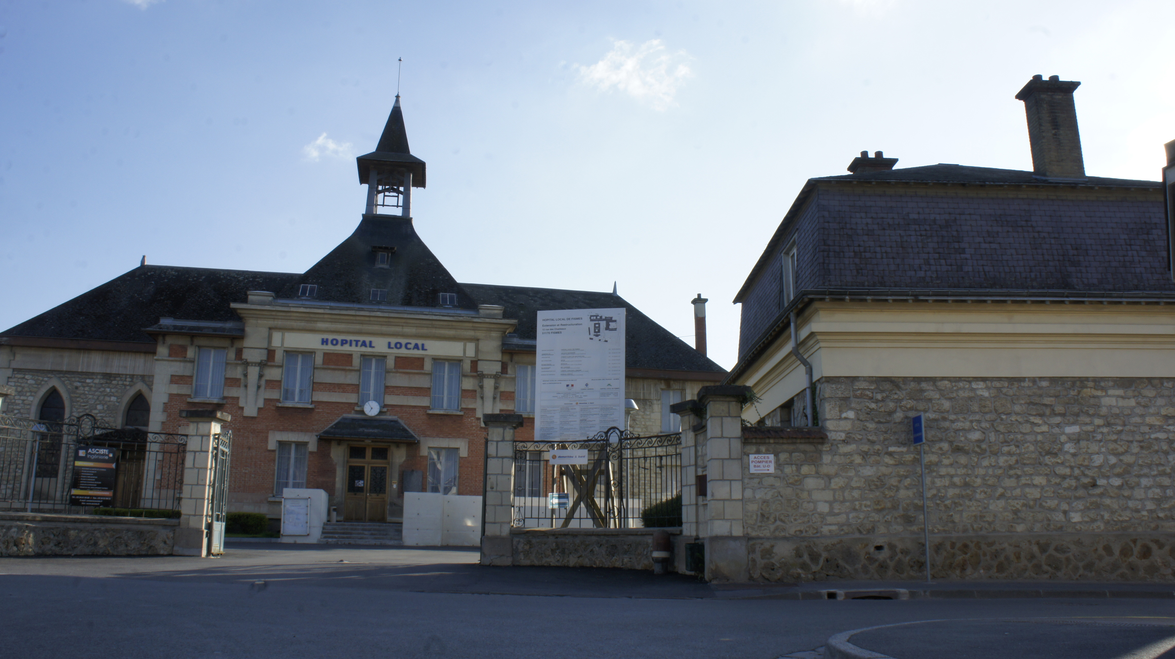 entrée de l'hôpital local de Fismes .